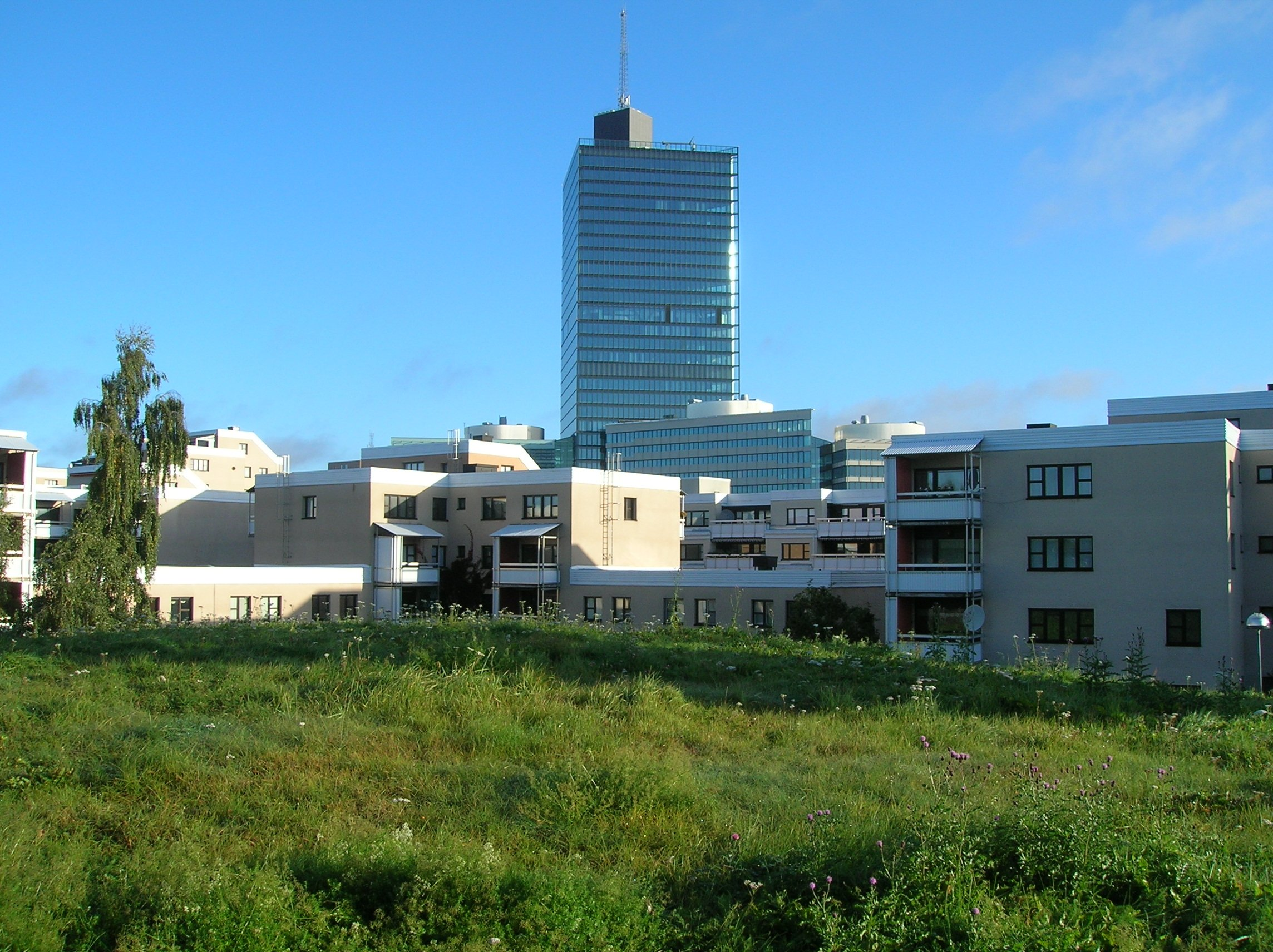 Kista Science Tower, Kista, Stockholm. Photo taken from Ärvingegången